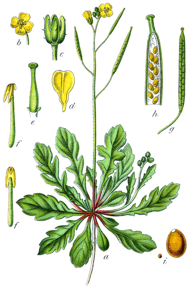 Diplotaxis muralis subsp. muralis, syn. Crucifera diplotaxis E.H.L.Krause Original Caption Mauer-Rauke, Crucifera diplotaxis